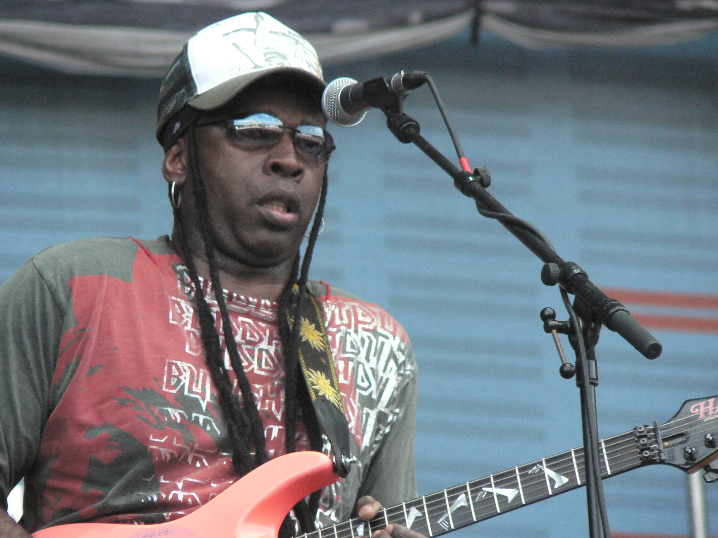 A felvétel 2006. augusztus 15-én készült Budapesten. Sziget Fesztivál, Living Colour koncert a Nagyszínpadon. ©© Derzsi Elekes Andor, Budapest, 2014, A kép egészben, vagy részletekben másolását, bármilyen úton történő sokszorosítását és felhasználását a szerző ellenérték nélkül, jogutódjaira is kihatóan megengedi. Az engedély kiterjed a kereskedelmi célú hasznosításra is. Kéri azonban nevének feltüntetését a felhasználás során. A Metapolisz sorozat valamennyi képe és filmje Creative Commons alatti valamint kereskedelmi - for profit - célra is felhasználható. Ajánlott hivatkozás: Derzsi Elekes Andor: Metapolisz DVD line